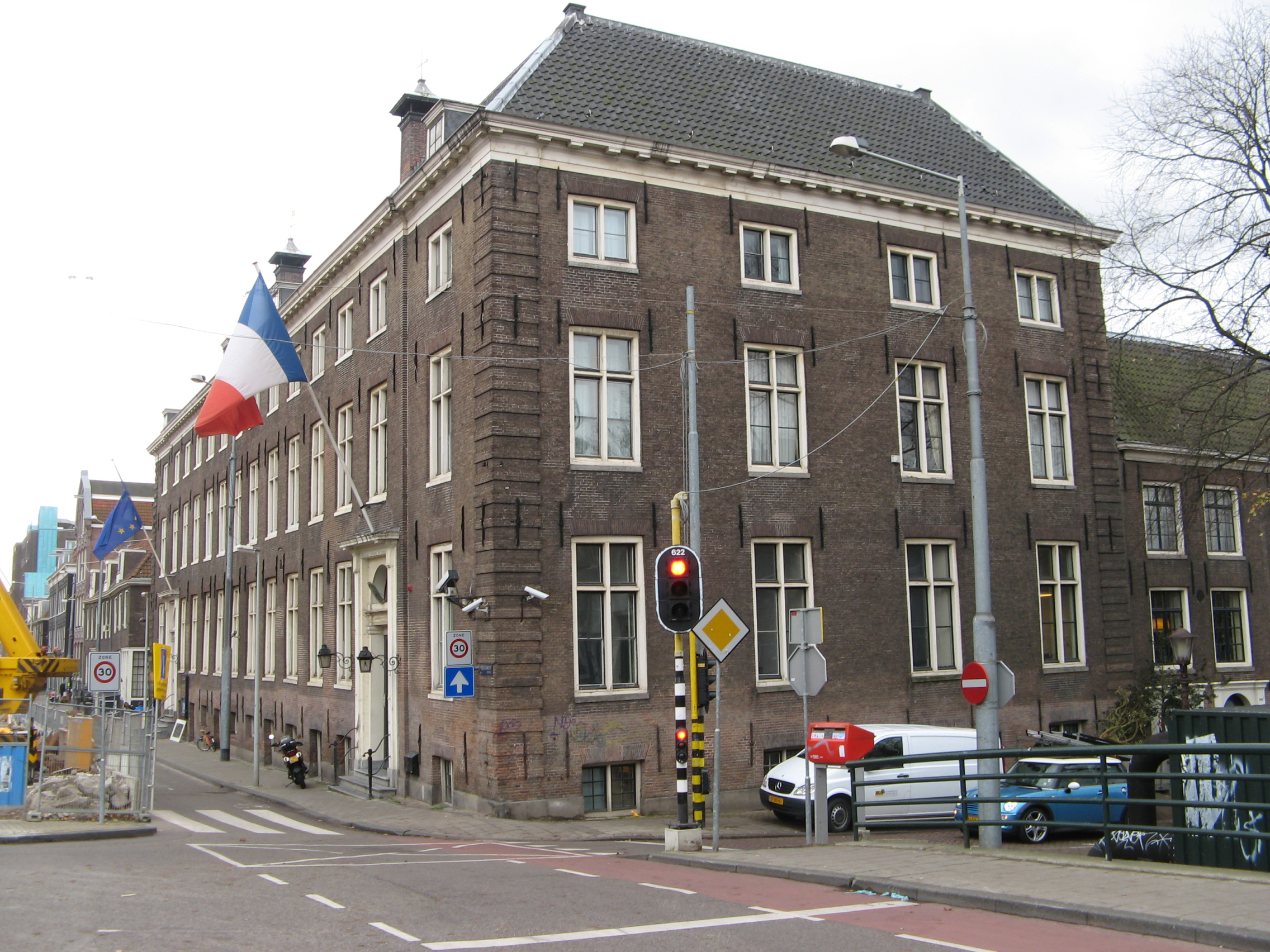 Walenweeshuis, nu Maison Descartes Amsterdam, Vijzelgracht 2